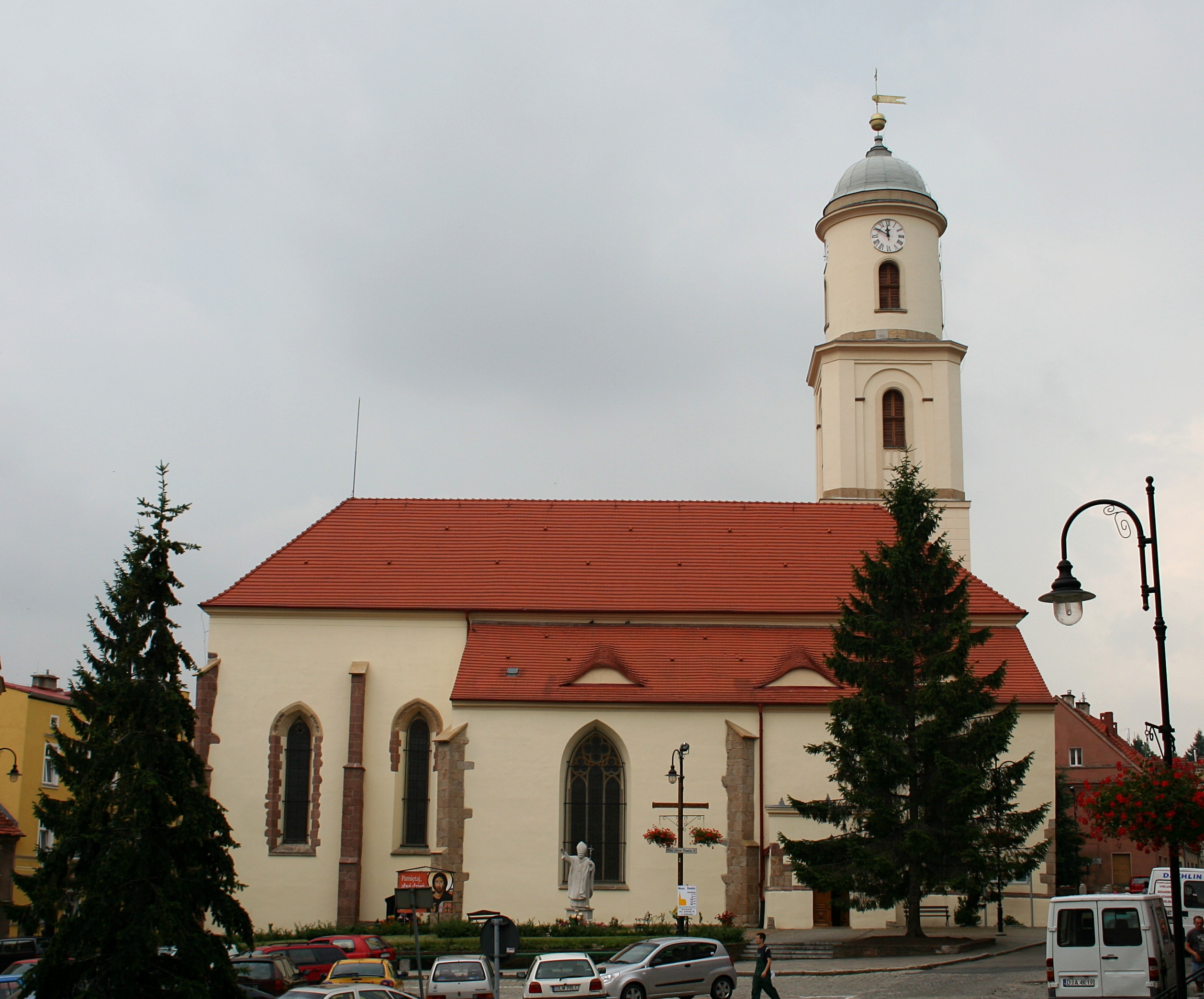 Bolków - rzymskokatolicki kościół parafialny p.w. św. Jadwigi, ok. 1300